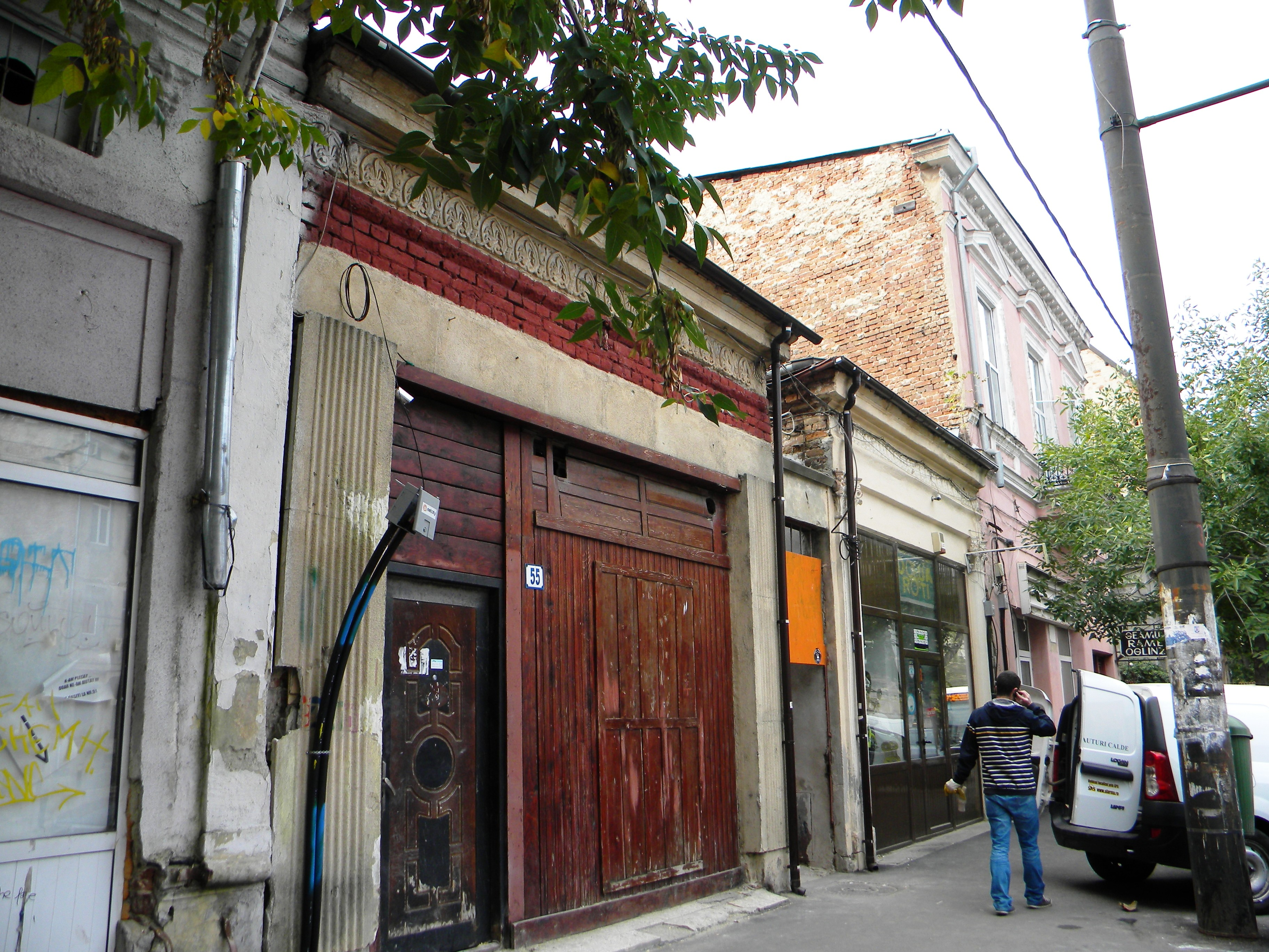 Bucuresti, Romania, Casa pe Calea Grivitei (Casa lui Th. Georgescu) nr. 55-57, sect. 1